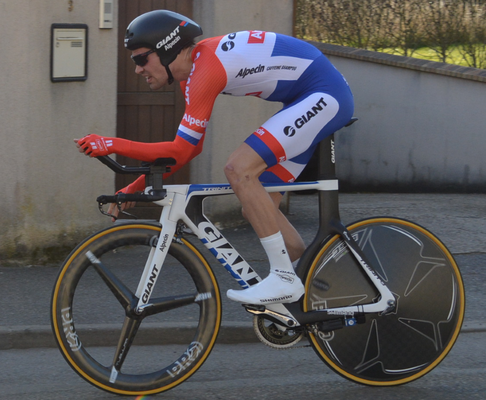 Tom Dumoulin à Paris-Nice 2015